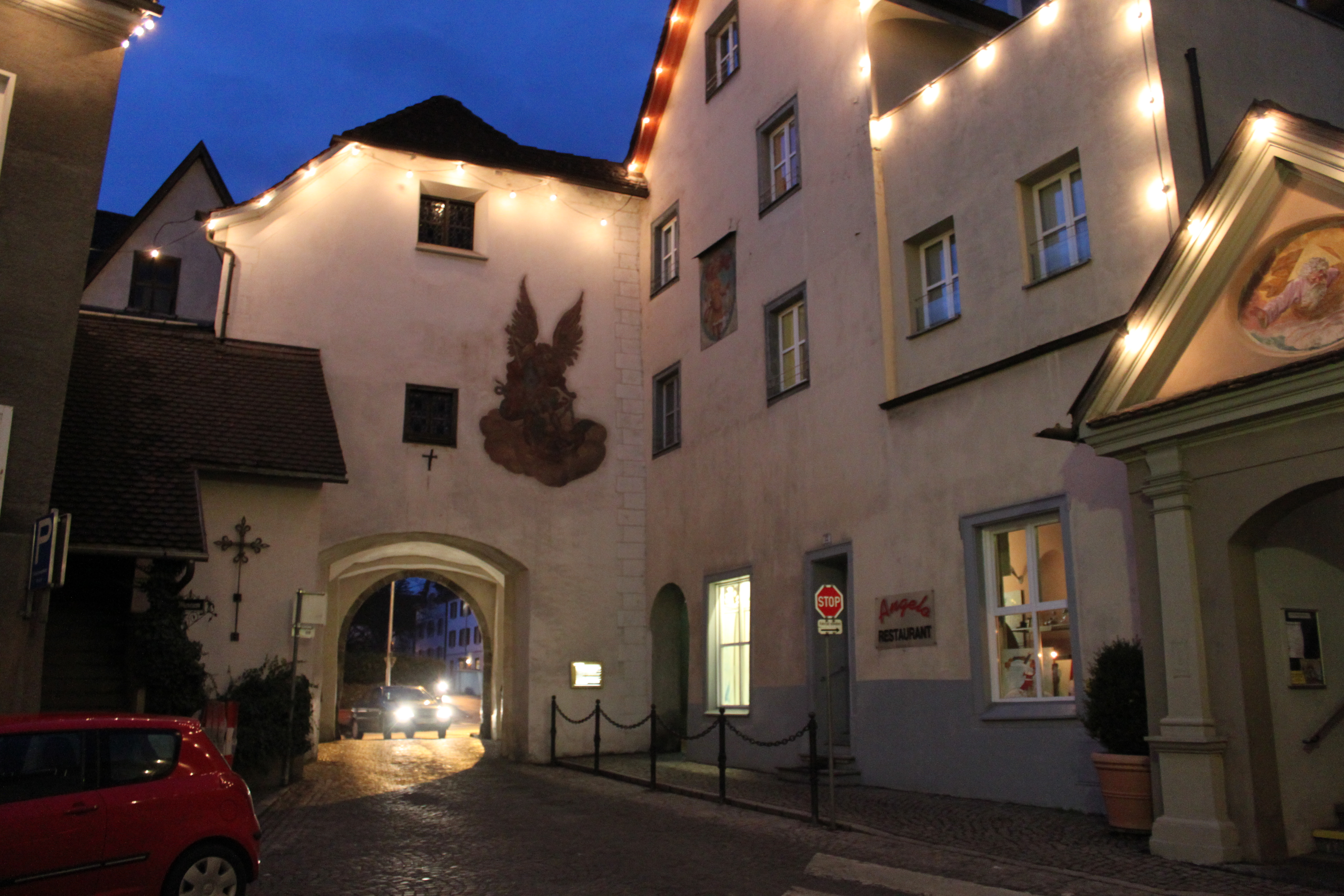 Stadtmuseum Bludenz, Bludenz, im Oberen Tor, auch: Feldkircher Tor, Herrengasse, das rote Auto parkt in der Kirchgasse